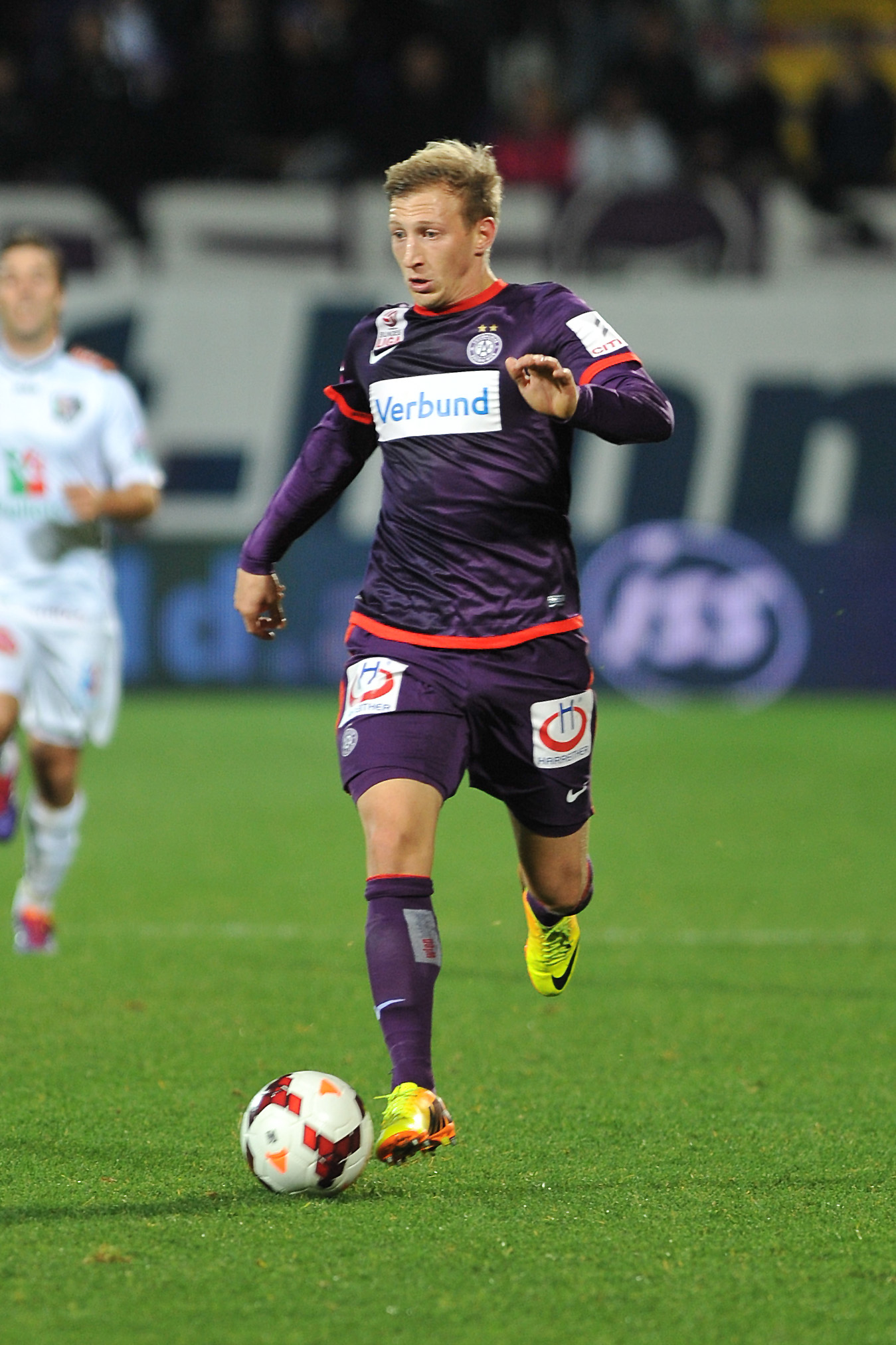 Bundesliga:FK Austria Wien - RZ Pellets WAC Daniel Royer